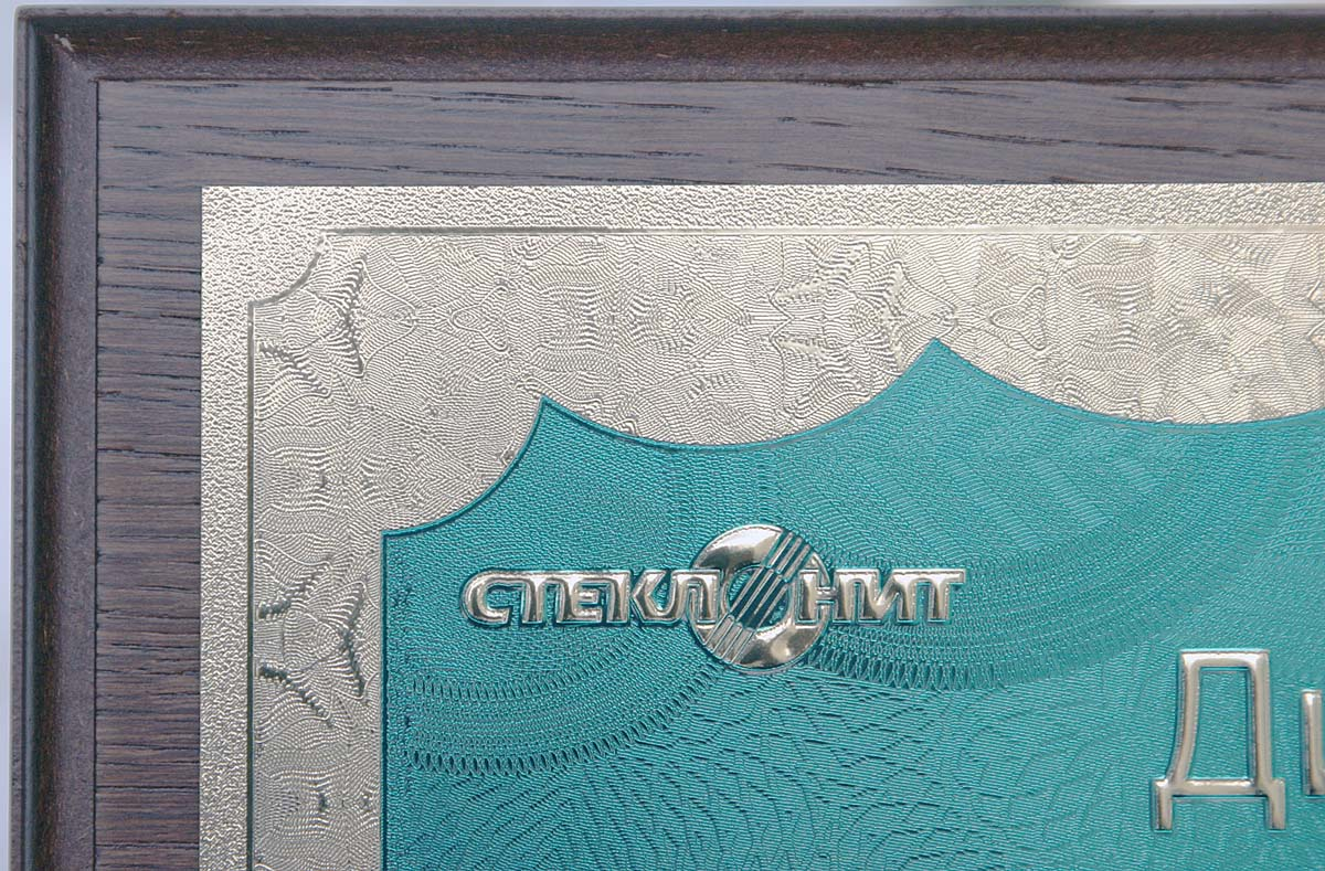 Плакетка с рельефным тиснением для компании Стеклонит